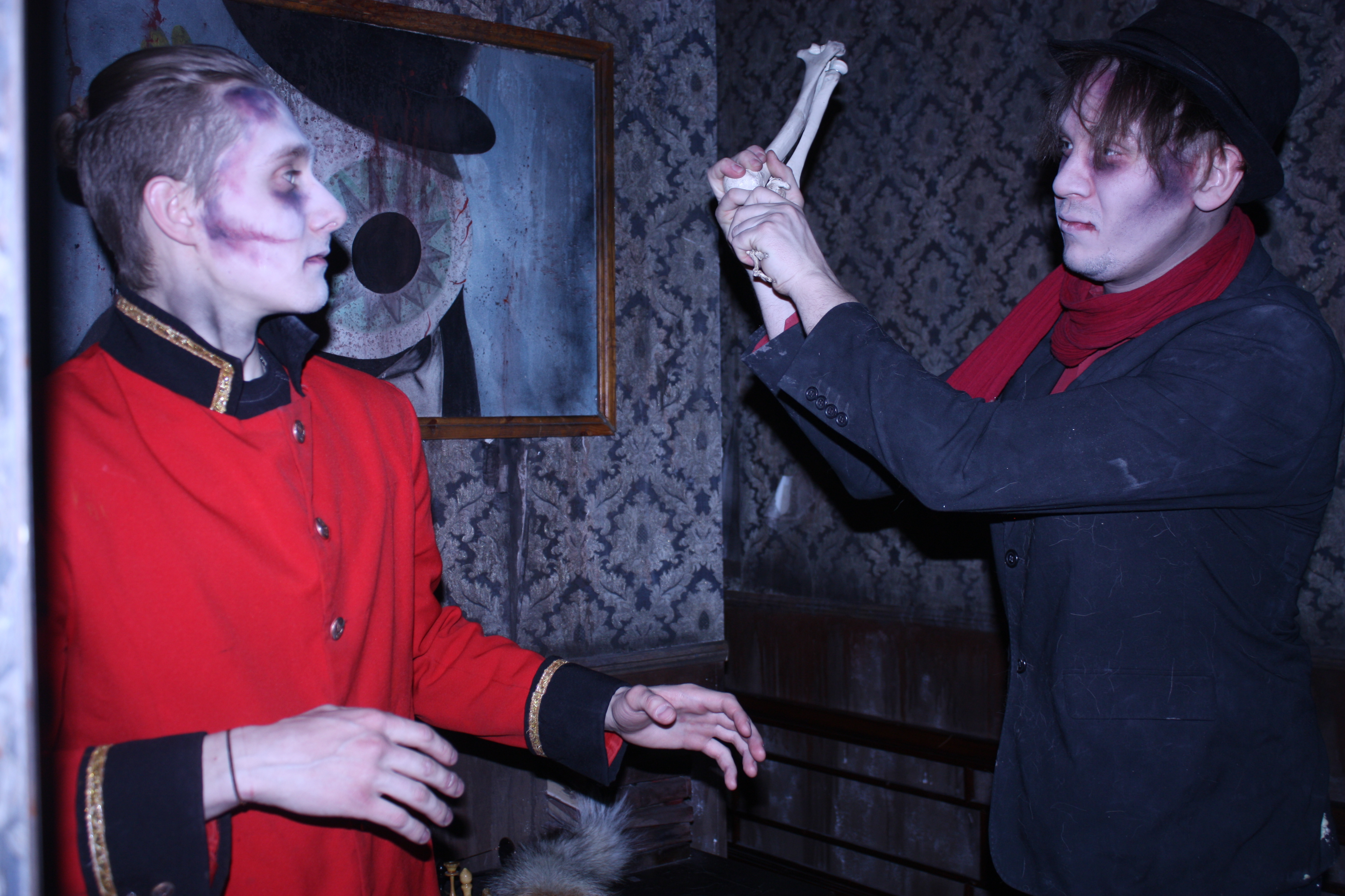 Актеры хоррор квеста